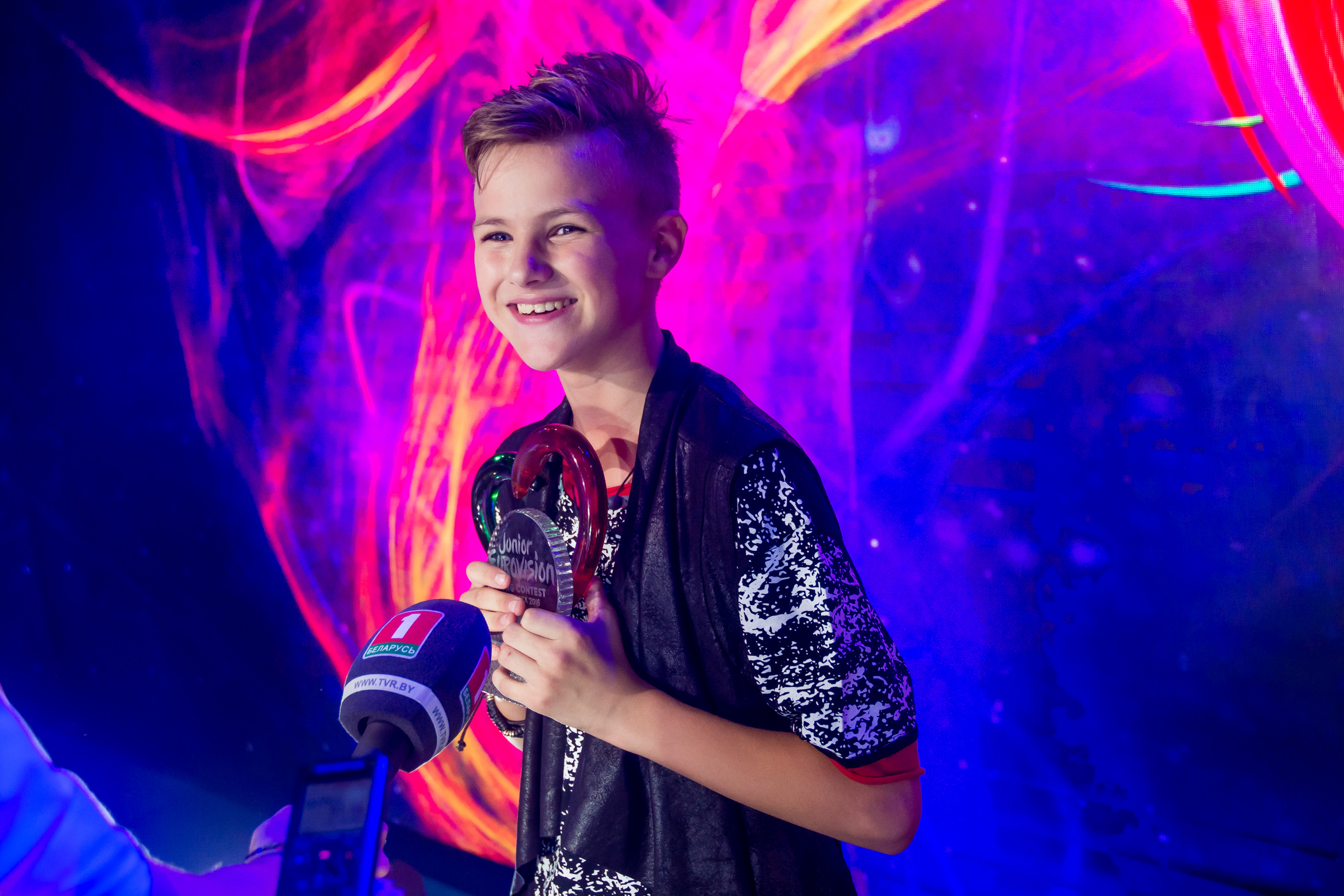 Александр Минёнок, интервью каналу Беларусь 1